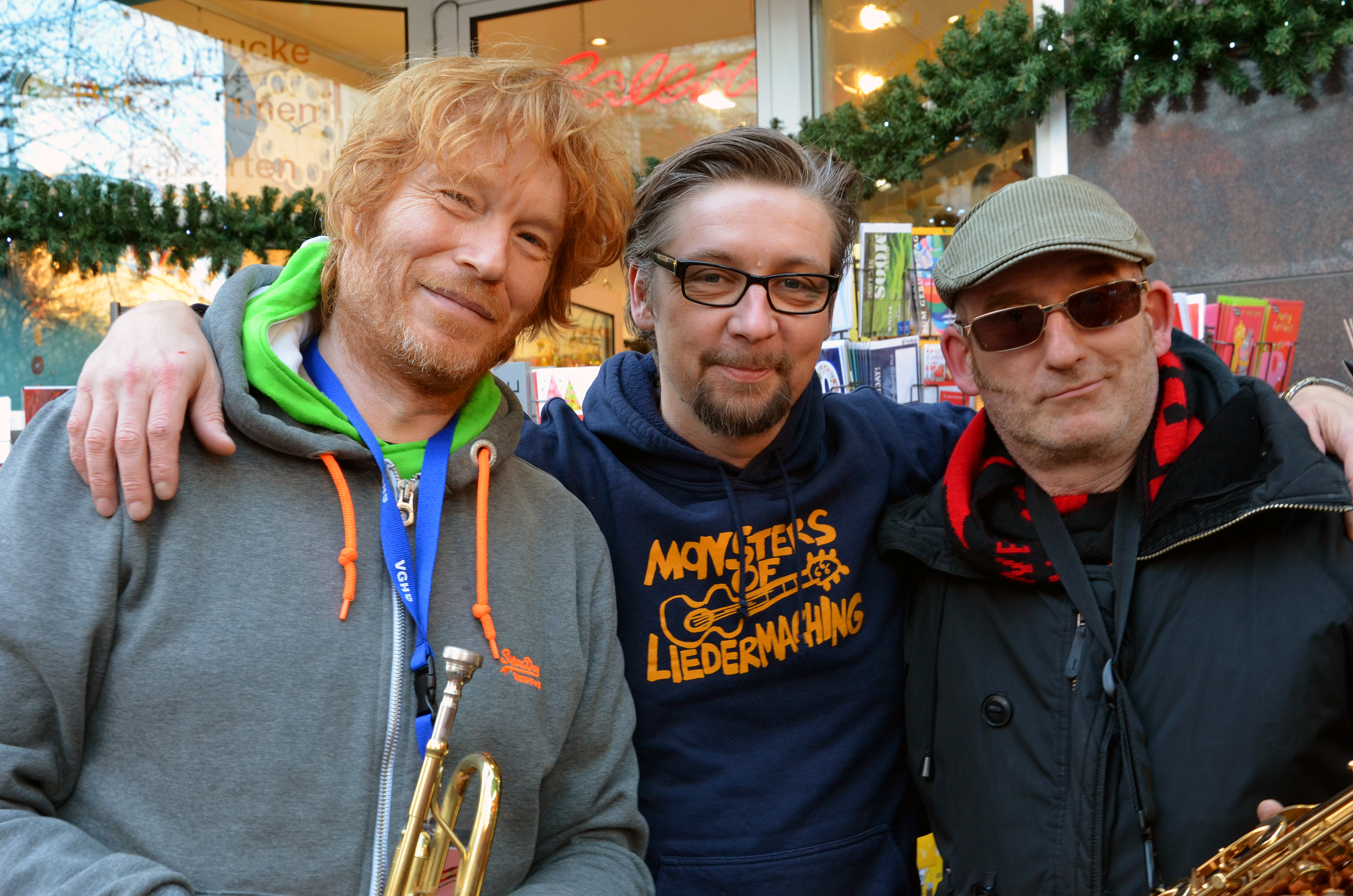 Zugunsten der Aktion die!!!weihnachstfeier, der weihnachtlichen Benefiz-Veranstaltung für Obdachlose, Bedürftige und Kinder am 15. Dezember 2013 im Hannover Congress Centrum (HCC), gab die hannoversche Musikgruppe Wohnraumhelden (von links: C-Punkt Stein-Schneider, B-Man Mayor Fabian Schulz und Saxophonist Krösus Thomas König) am Vortag ihre letzten open-airs mit ihrer rollenden Ape-Bühne vor Heinz & Heinz (Gretchenstraße Ecke Lister Meile) und anschließend am Küchengarten in Linden ...